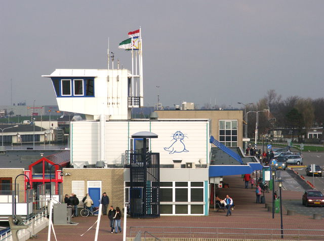 De terminal van Rederij Doeksen, te Harlingen